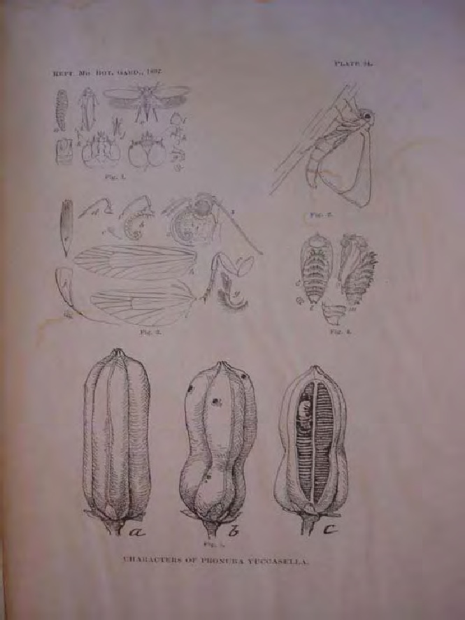 Insecte pollinisateur de Yucca filifera